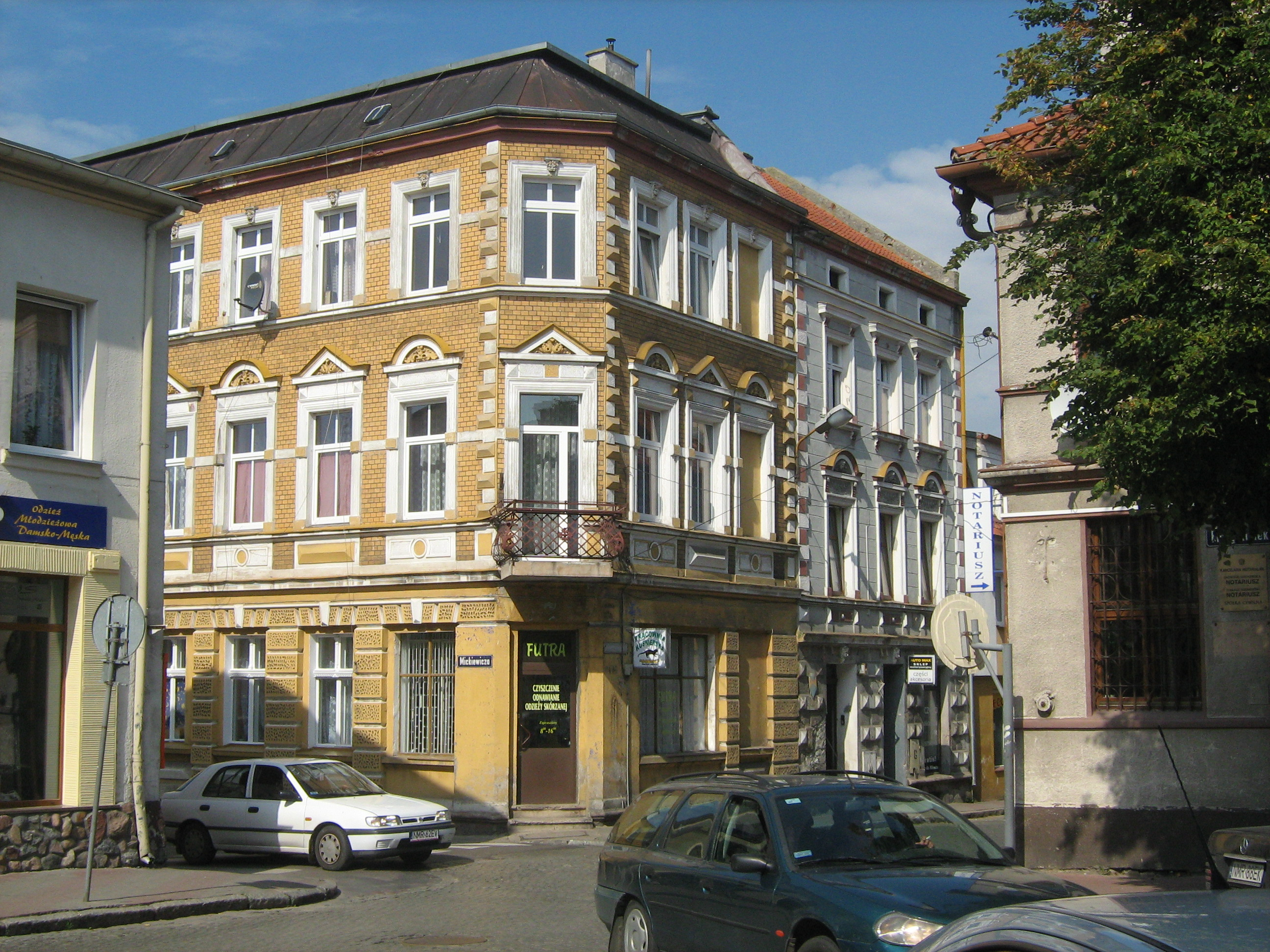 Mrągowo, ul. Adama Mickiewicza 2 / róg ulicy Kościuszki - kamienica